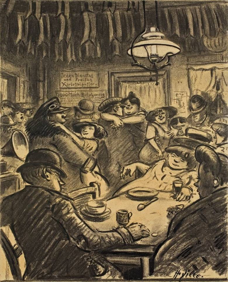 In der Kaschemme. Um 1910. Kohle auf leichtem Karton. 32,3 x 26,2 cm